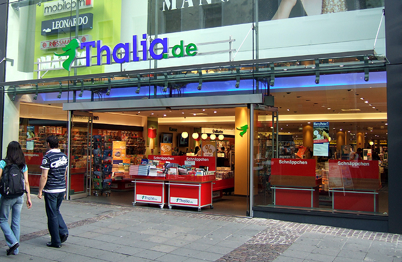 Thalia Buchhandlung in Darmstadt